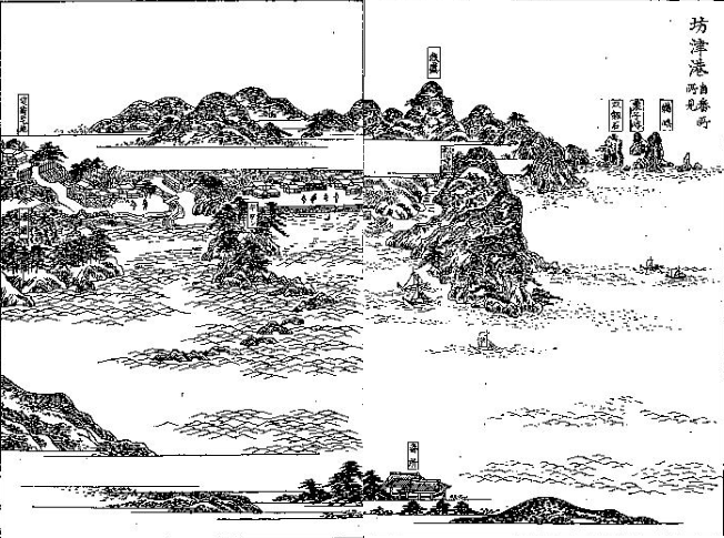 坊津港を描いた挿絵